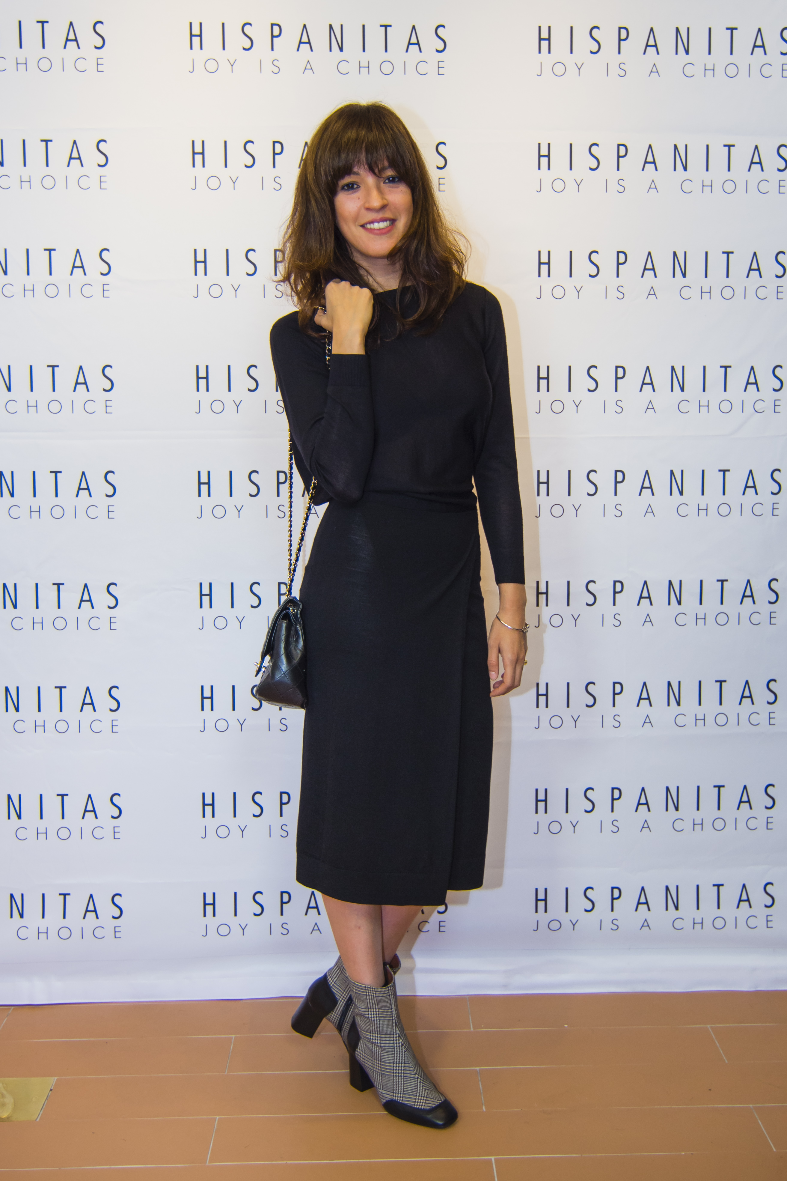 Verónica Sánchez en la inauguración de la tienda de Hispanitas en la calle Velázquez de Madrid (20 de octubre de 2016)